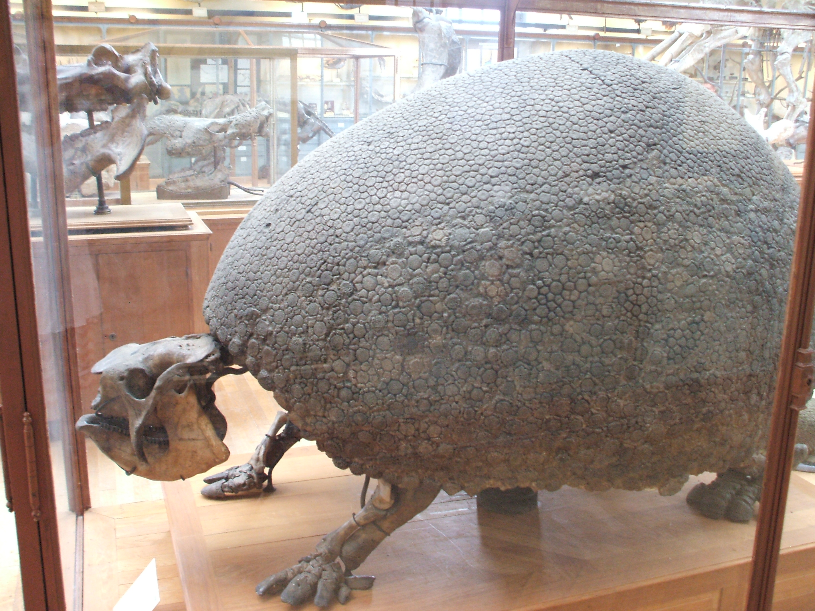 Glyptodon asper du Muséum National d'Histoire Naturelle de Paris (France).